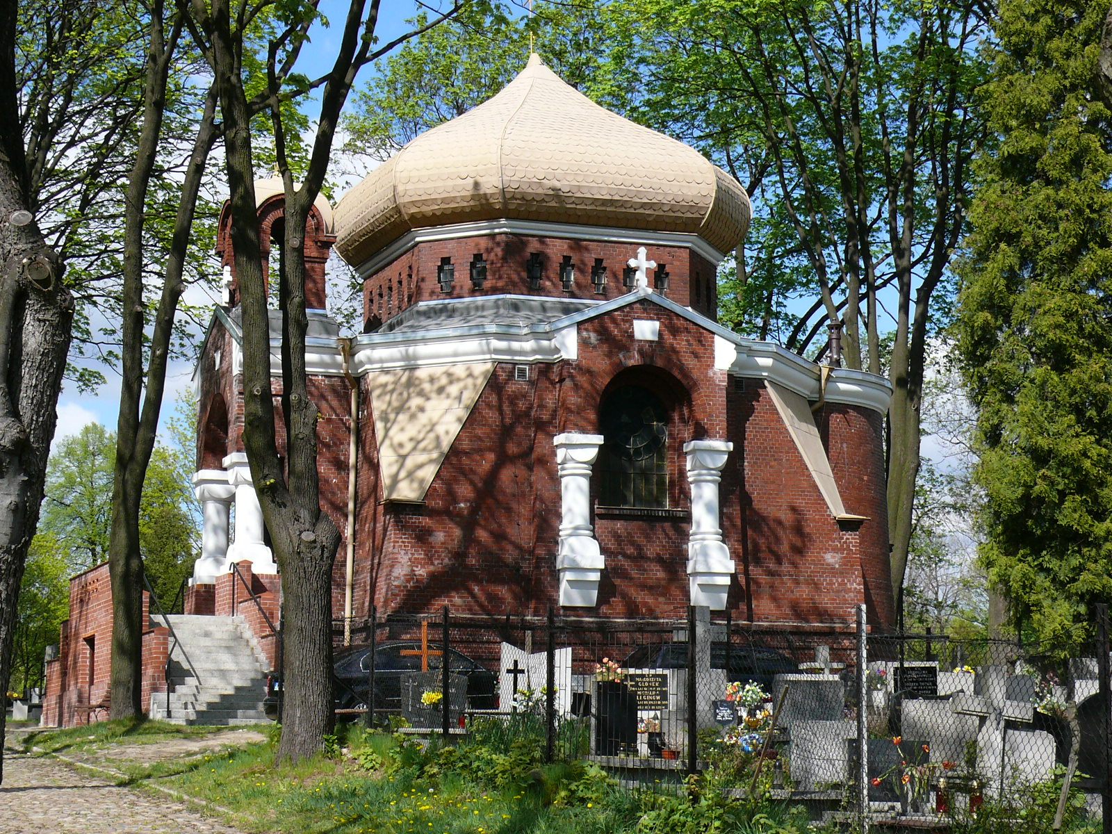 Cerkiew pw. Zaśnięcia N.M.P. na cmentarzu na Dołach, ul. Telefoniczna 4 w Łodzi